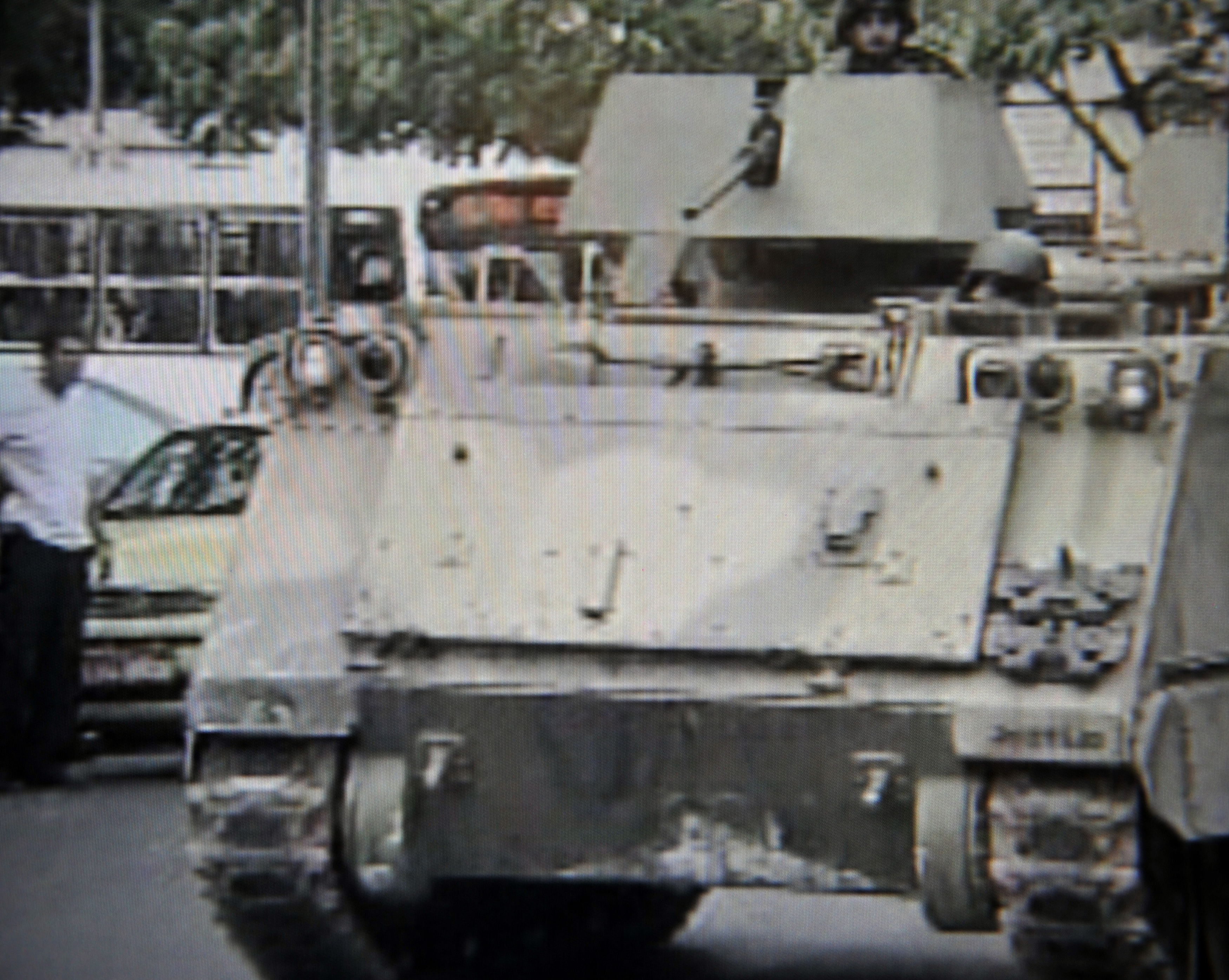 Operação de ocupação pela polícia da Vila Cruzeiro, na Penha, na zona norte do Rio, que era considerada uma fortaleza do tráfico. Reprodução de imagens da TV Brasil (ABr)